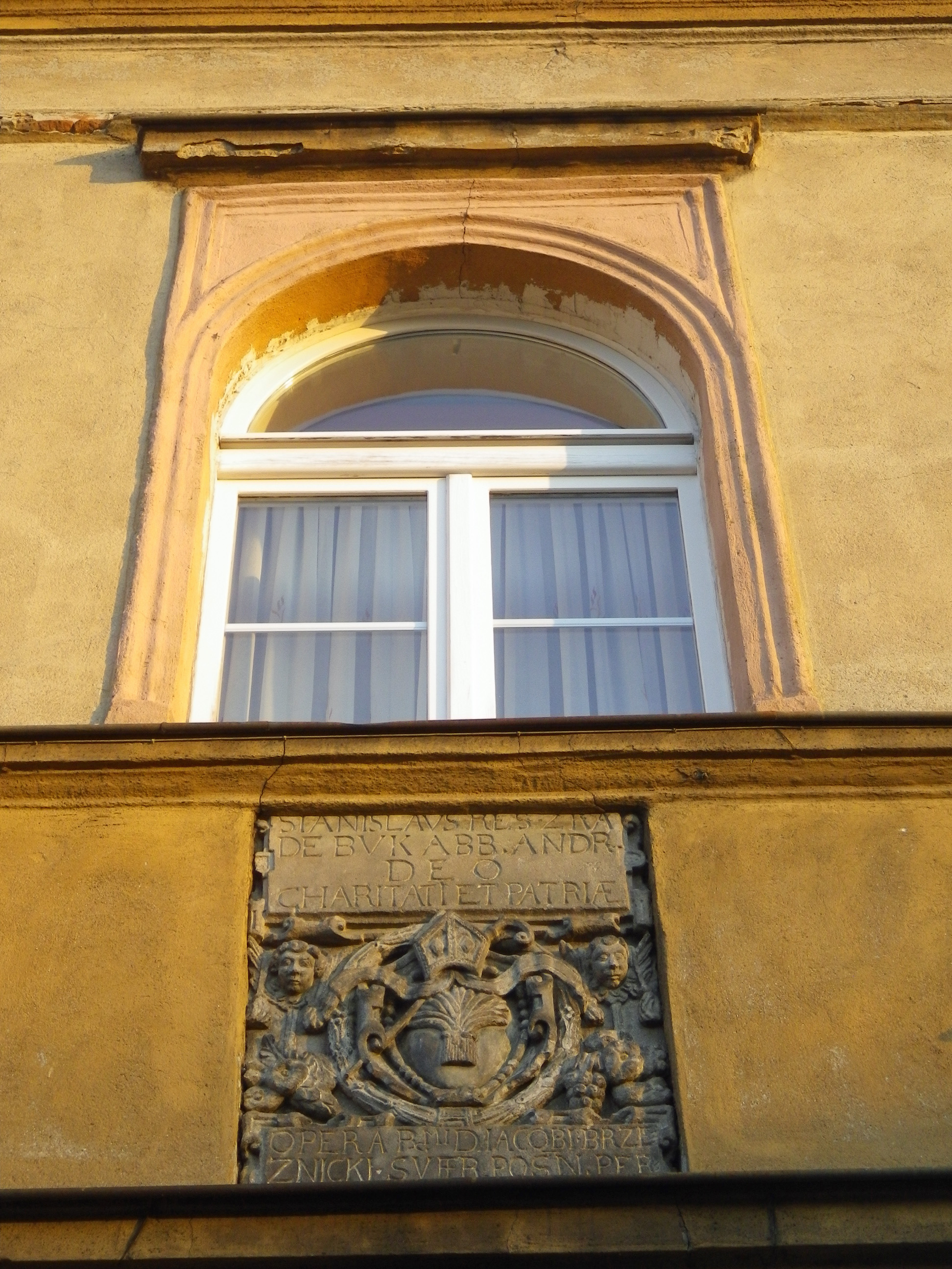 Inskrypcja poświęcona Stanisławowi Reszce ponad wejściem do dawnego szpitala św. Ducha w Buku (pow. poznański)